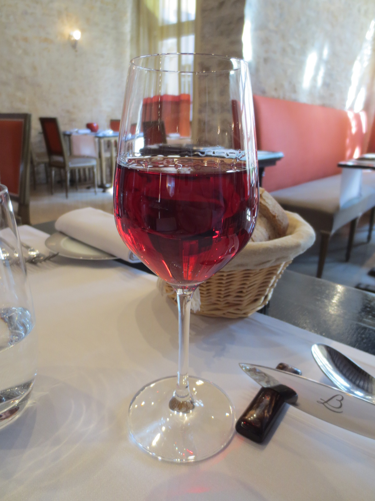 Wines of Burgundy